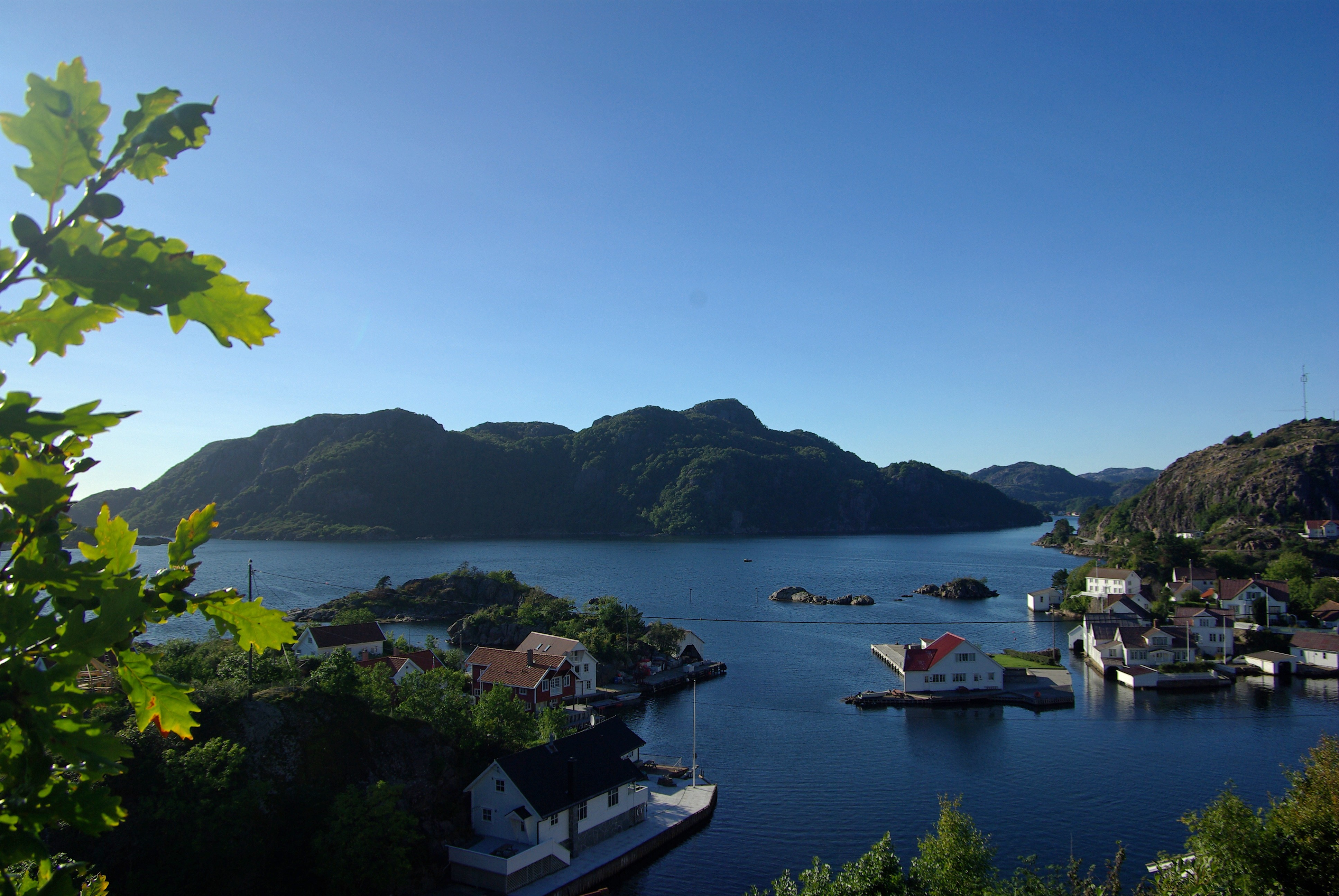 Hidra